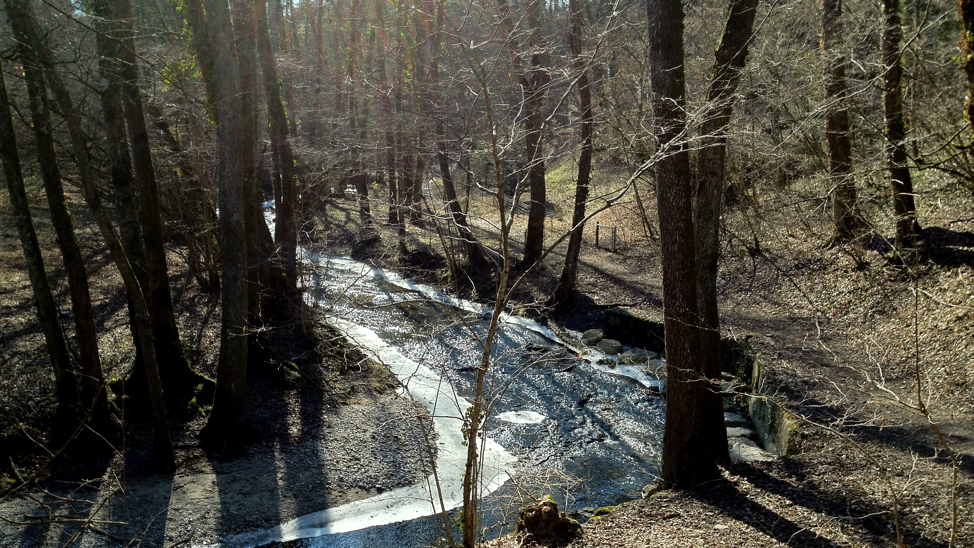 A deux pas du village d'Hermance, sur le Pont du Bourg-Dessus; la France est située sur la rive droite, la Suisse sur la gauche.